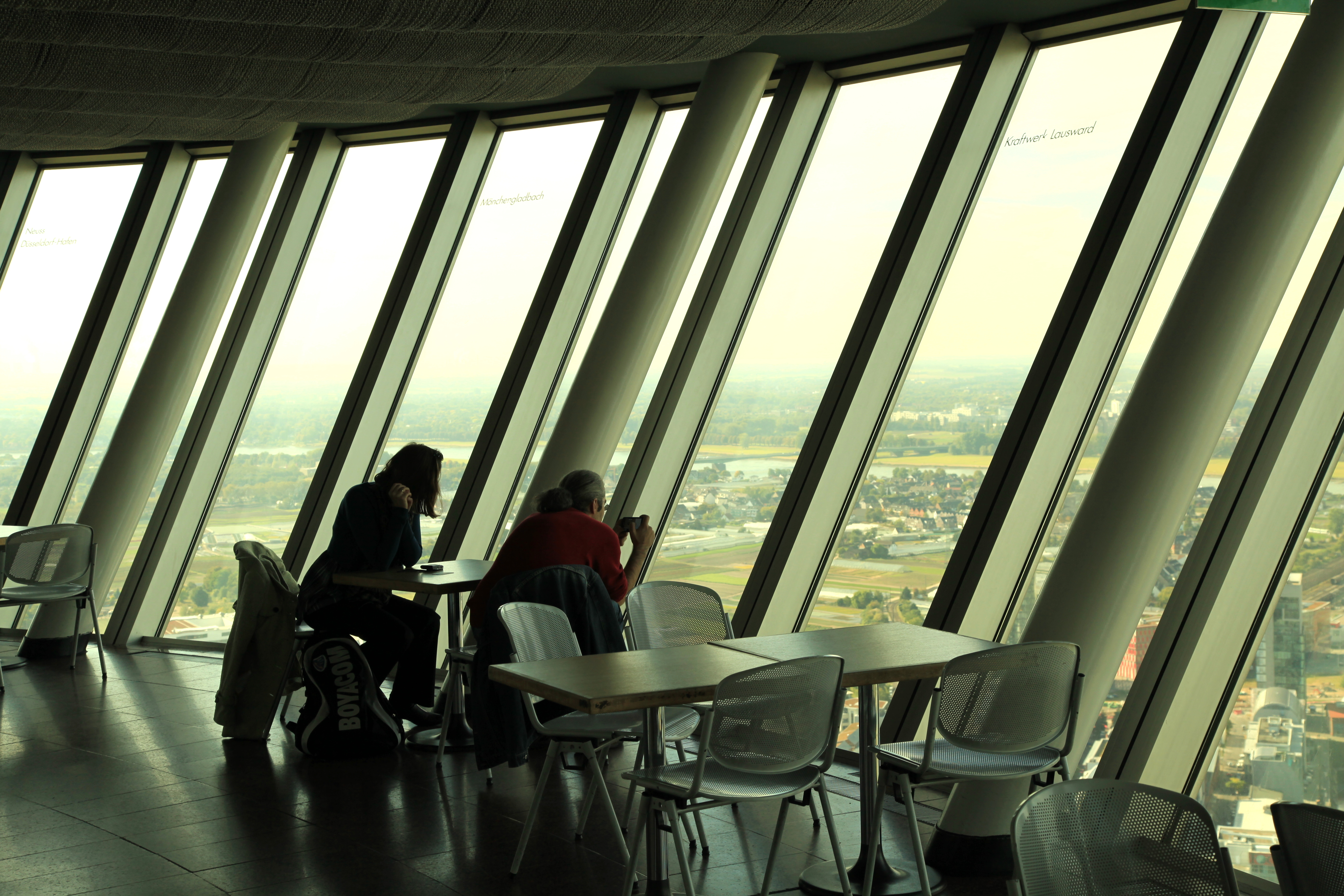 Rheinturm am Parlamentsufer in Düsseldorf